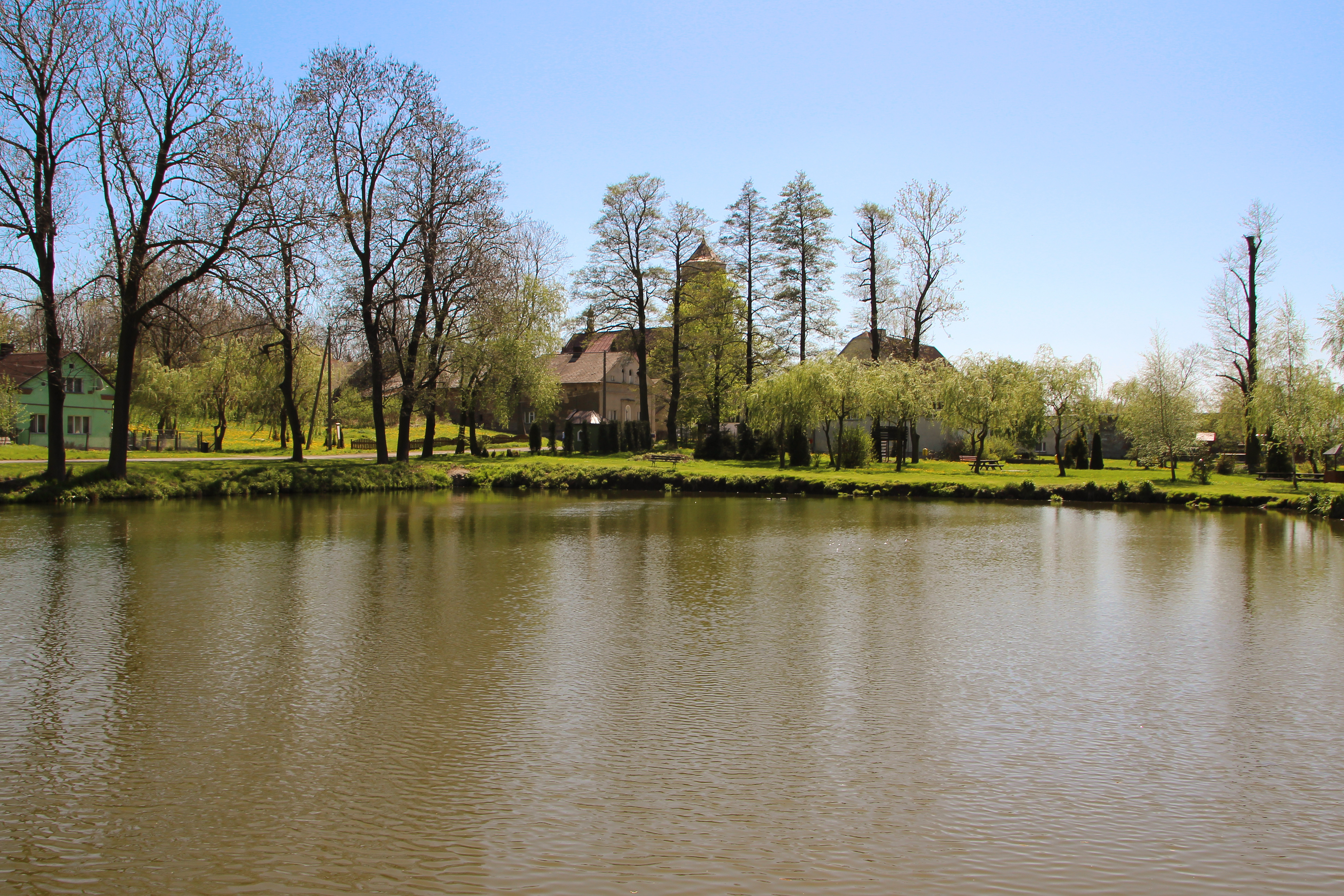 Pilszcz – kościół pątniczy parafialny pw. Wniebowzięcia NMP, z 1593 r. - XVI wieku, 1777 r., stanowiący obecnie sanktuarium Matki Boskiej Pilszczańskiej.